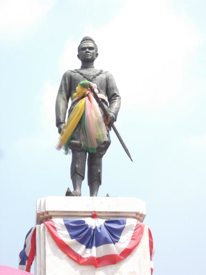 พระบรมราชานุสาวรีย์สมเด็จพระรามาธิบดีที่ 1 (พระเจ้าอู่ทอง)